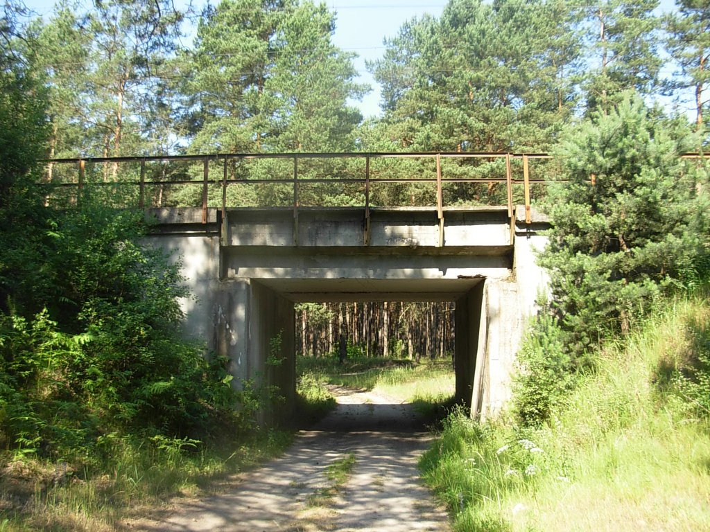 Puszcza Bydgoska, wiadukt kolejowy nad drogą leśną, w rejonie zanikłej wsi Łążyn